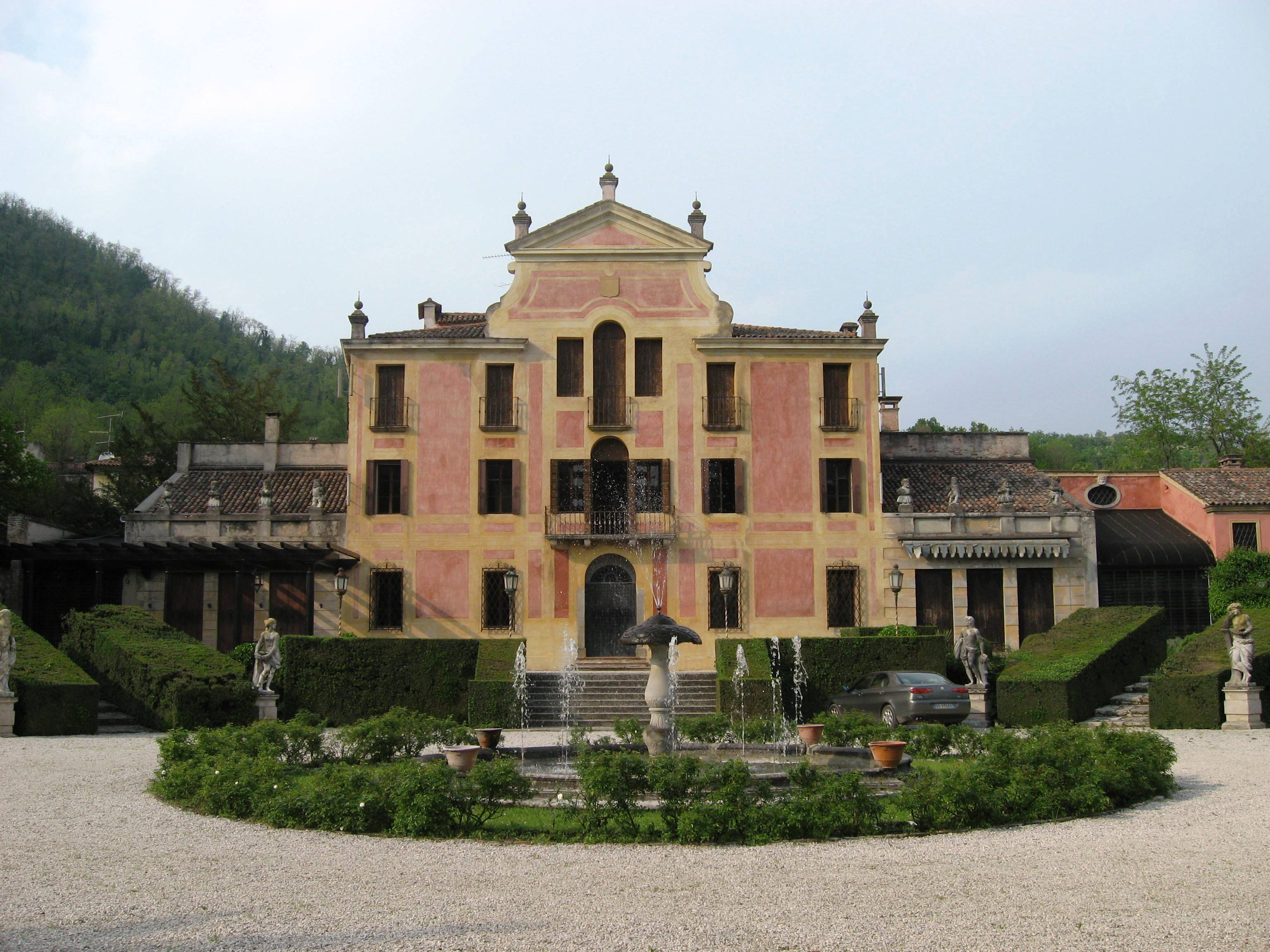 Facciata di Villa Barbarigo a Valsanzibio.